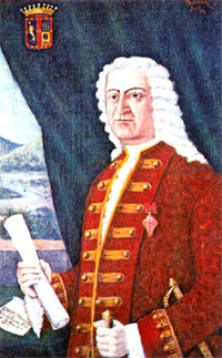 Domingo Ortiz de Rozas (Rozas, Cantabria, España, 1683 - alta mar, 1756) fue un noble y militar español quien fuera nombrado gobernador del Río de la Plata y posteriormente como capitán general de Chile, siendo ambos territorios, dependencias autónomas del Virreinato del Perú, y por su labor administrativa colonial sería nombrado por el rey Fernando VI de España como conde de Poblaciones.